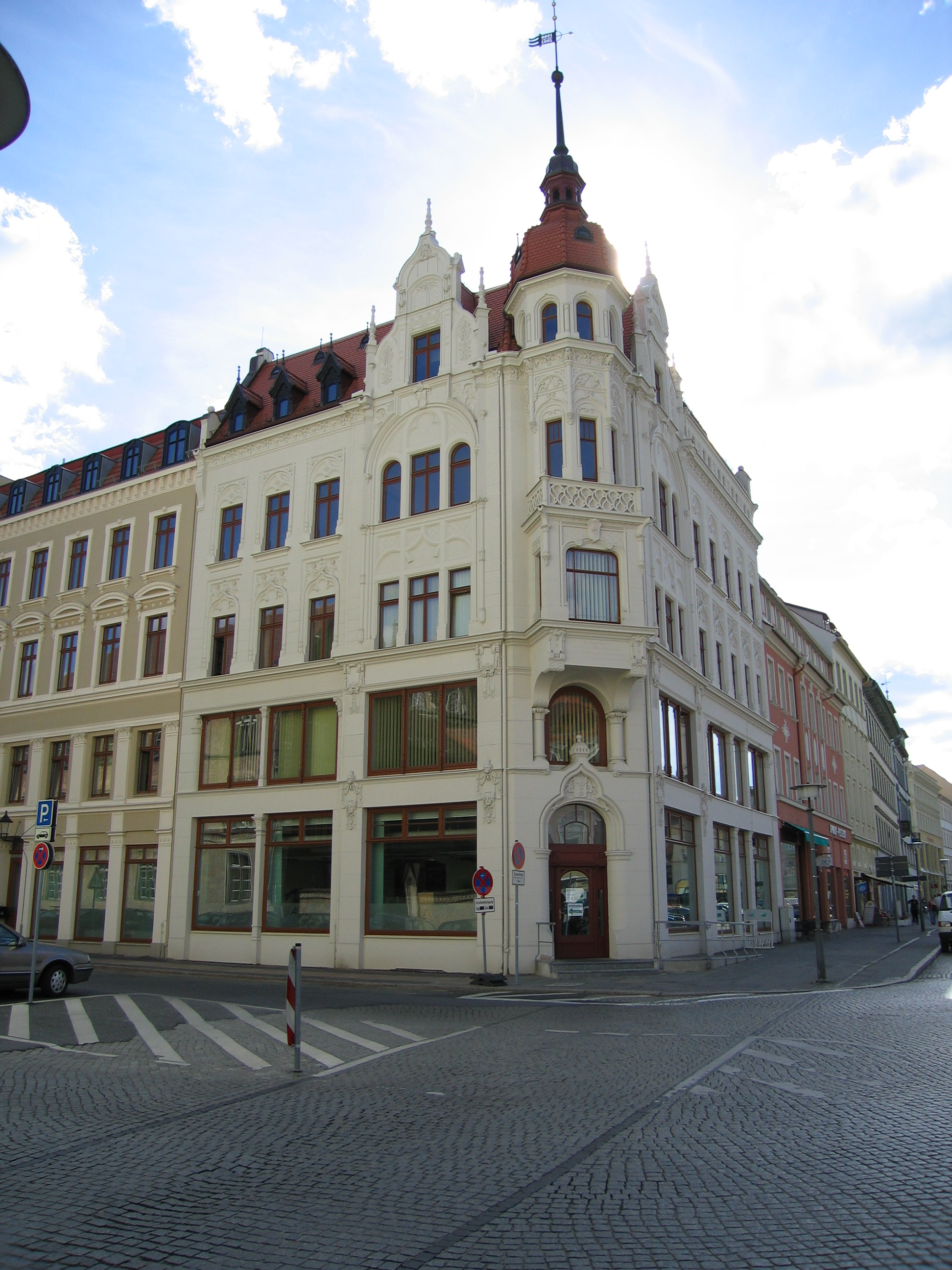 AOK-Gebäude, Obermarkt Ecke Klosterplatz in Görlitz